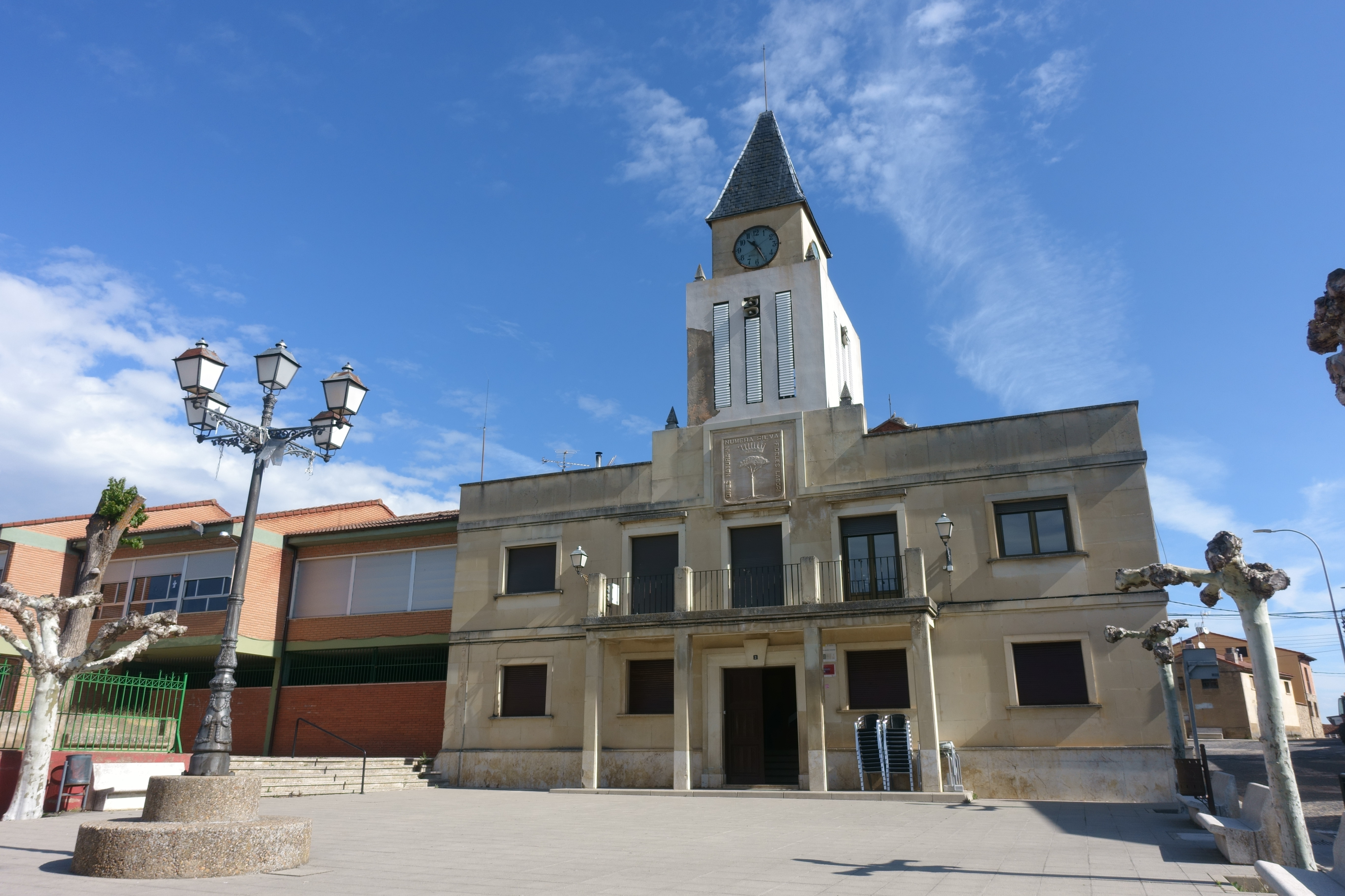 Casa consistorial de Tardelcuende (Soria, España).